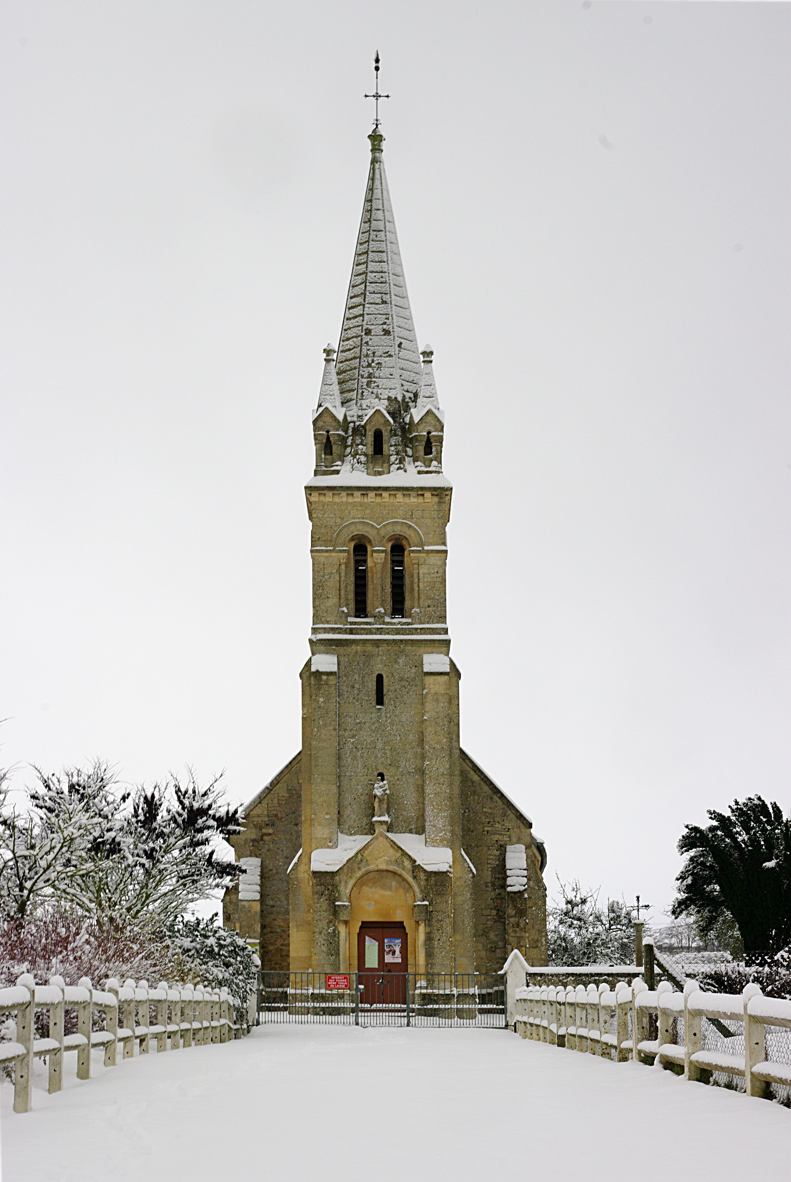 L'église Notre-Dame de Laize-la-Ville sous la neige, Calvados